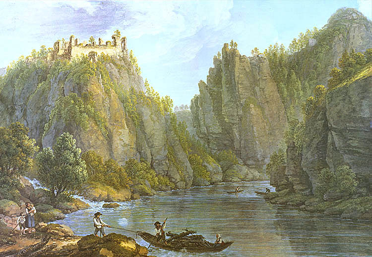 Ferdinand Runk - zřícenina hradu Dívčí Kámen, počátek 19. století